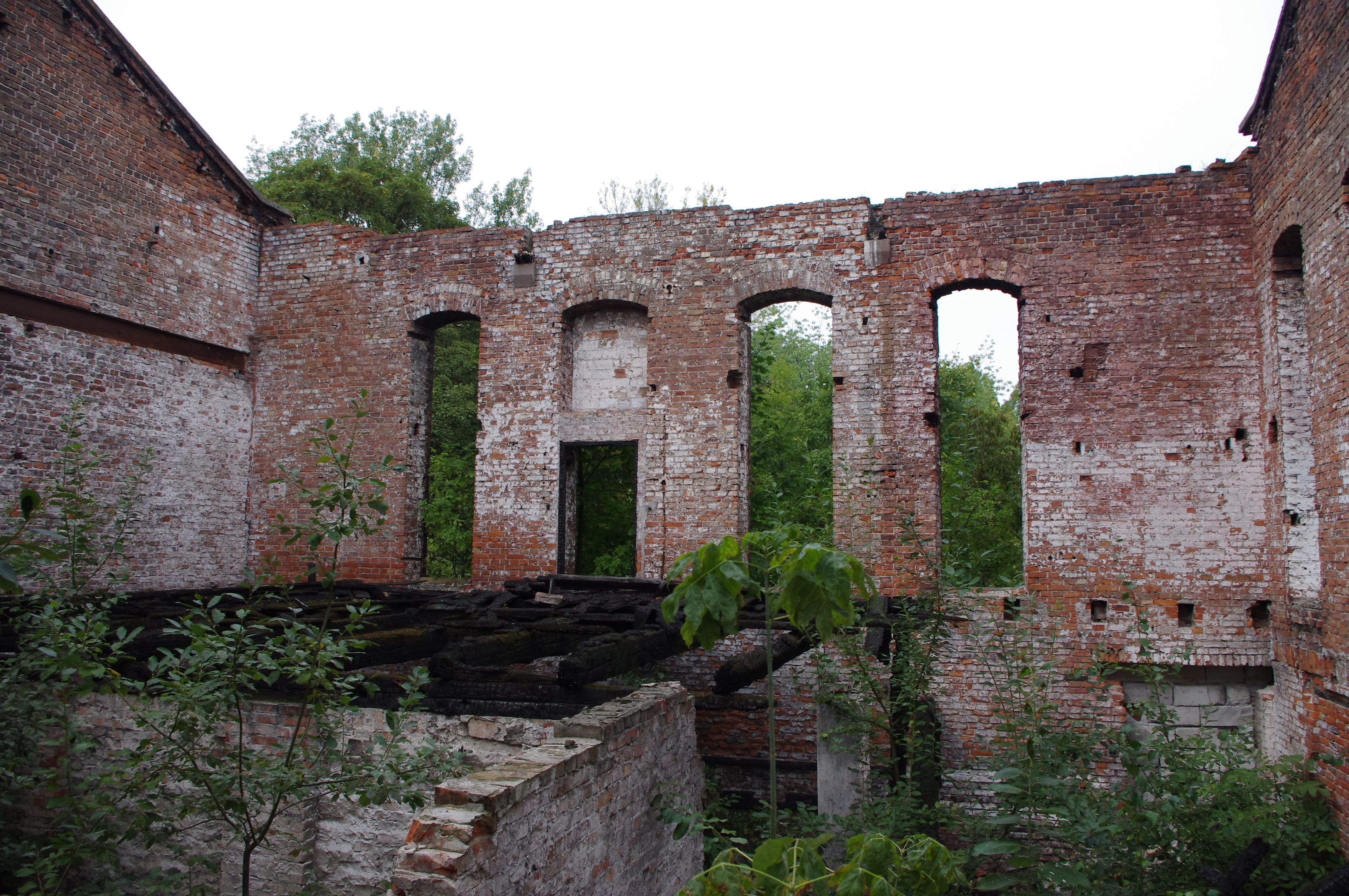 Młyn zbożowy z 1899 r., będący częścią Kompleksu młyńskiego Ludwika Michla przy ul. Objazdowej w Warszawie